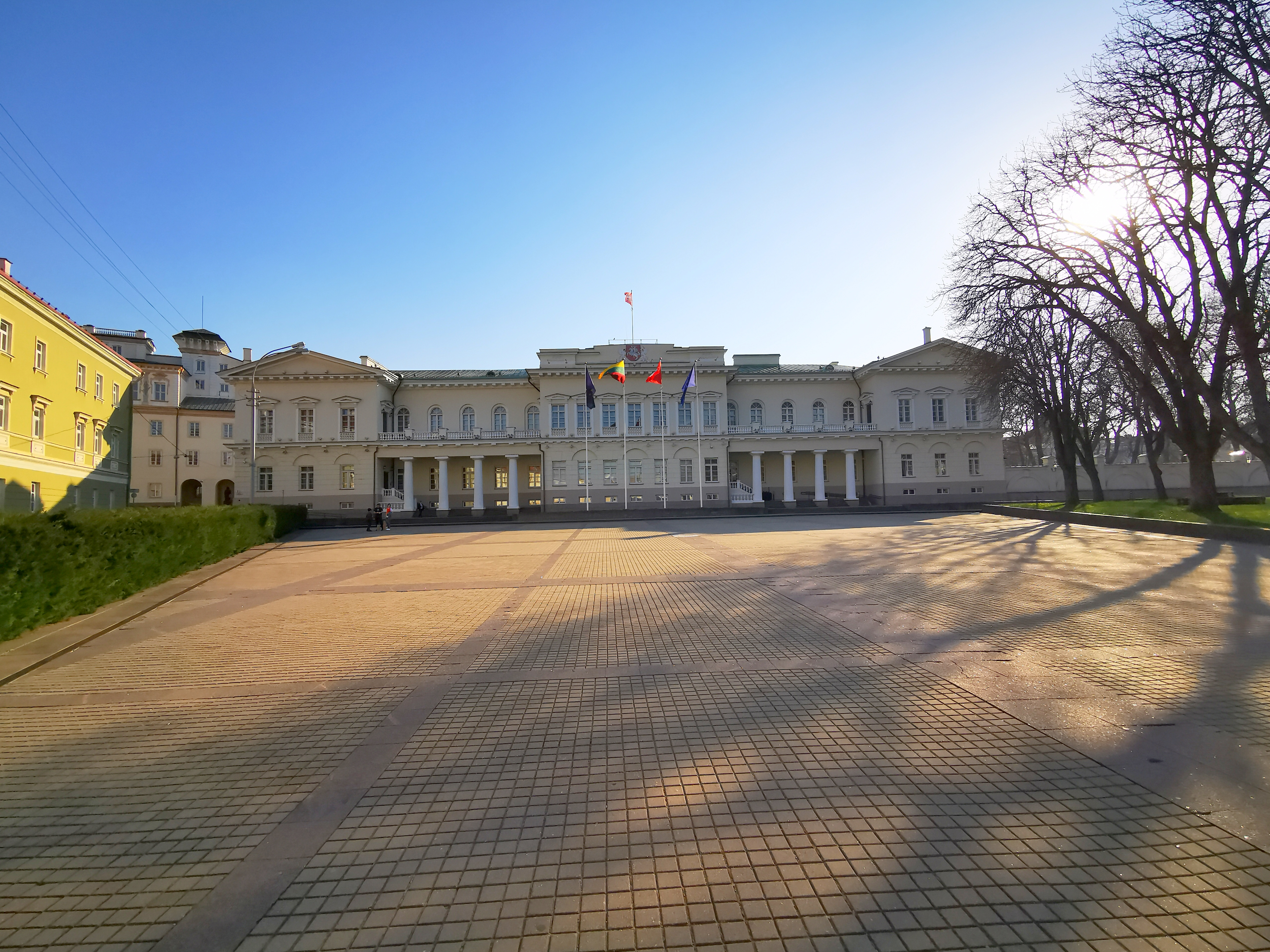 Daukanto aikštė